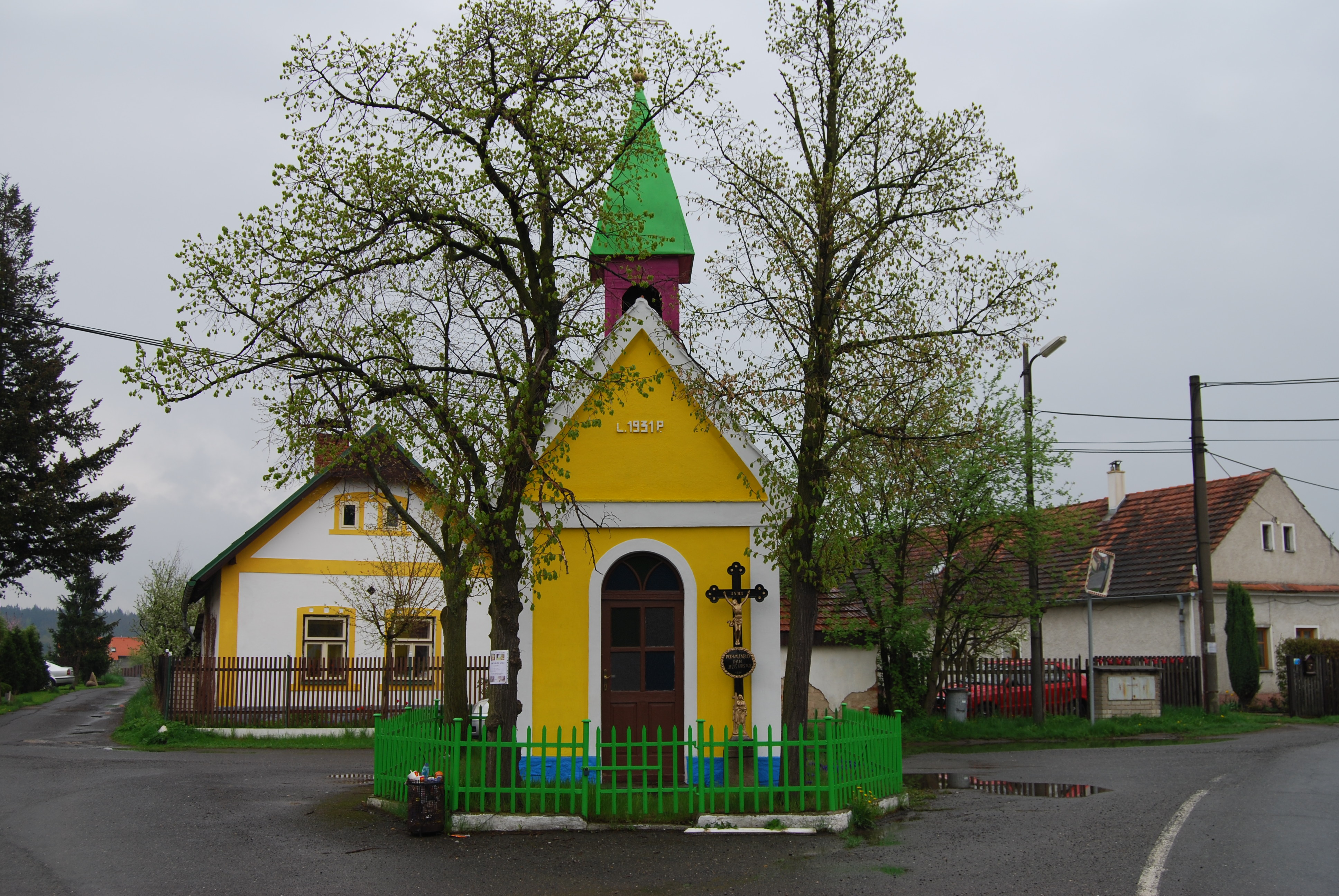 Návesní kaple s křížem. Rybníky (okres Příbram). Česká republika. - Google Maps - Google Earth